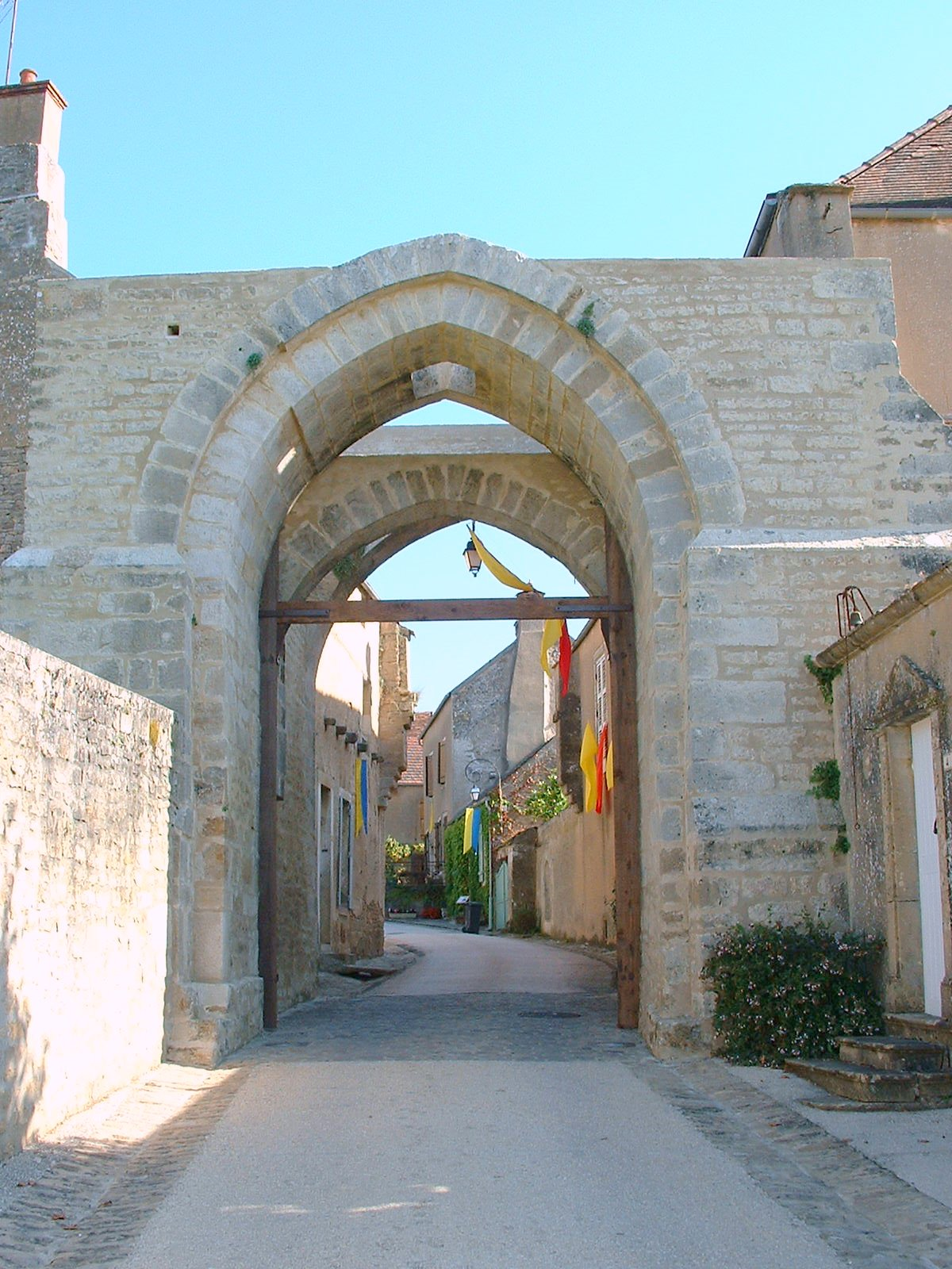 Montréal (Yonne) - fortifications Porte d'en Bas